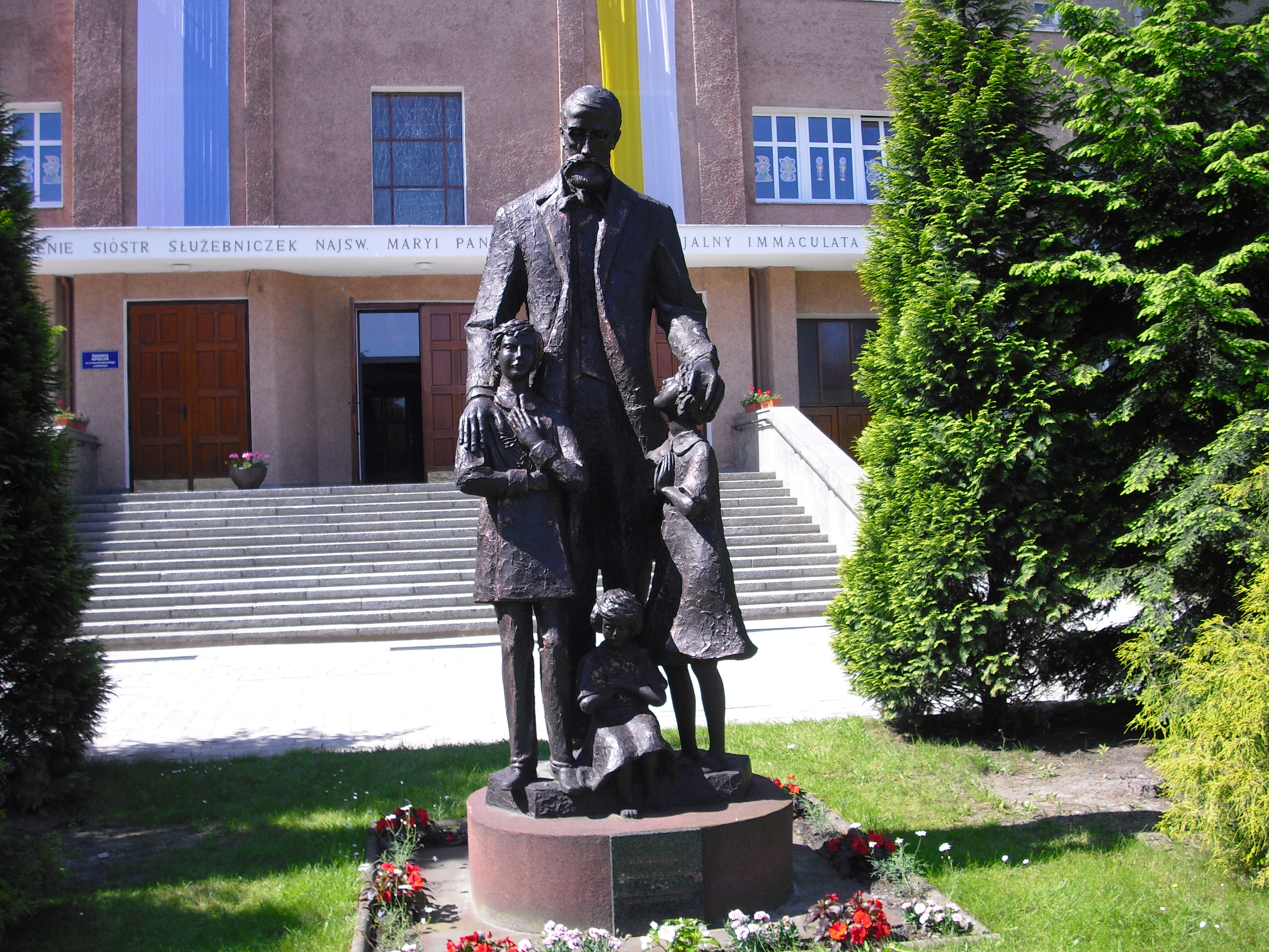 Pomnik Edmunda Bojanowskiego przy domu zgromadzenia SS NMP Niepokalanie Poczętej w Katowicach Panewnikach.